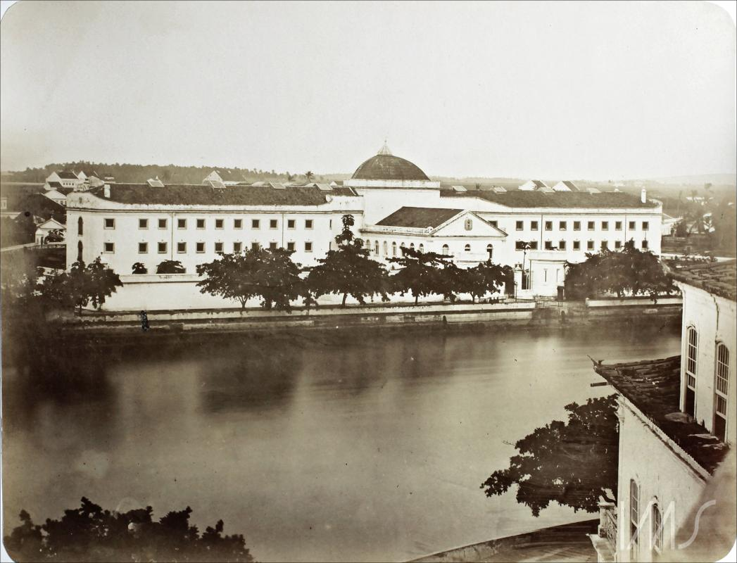 Antiga Casa de Detenção, hoje Casa da Cultura — Recife, Pernambuco, Brasil